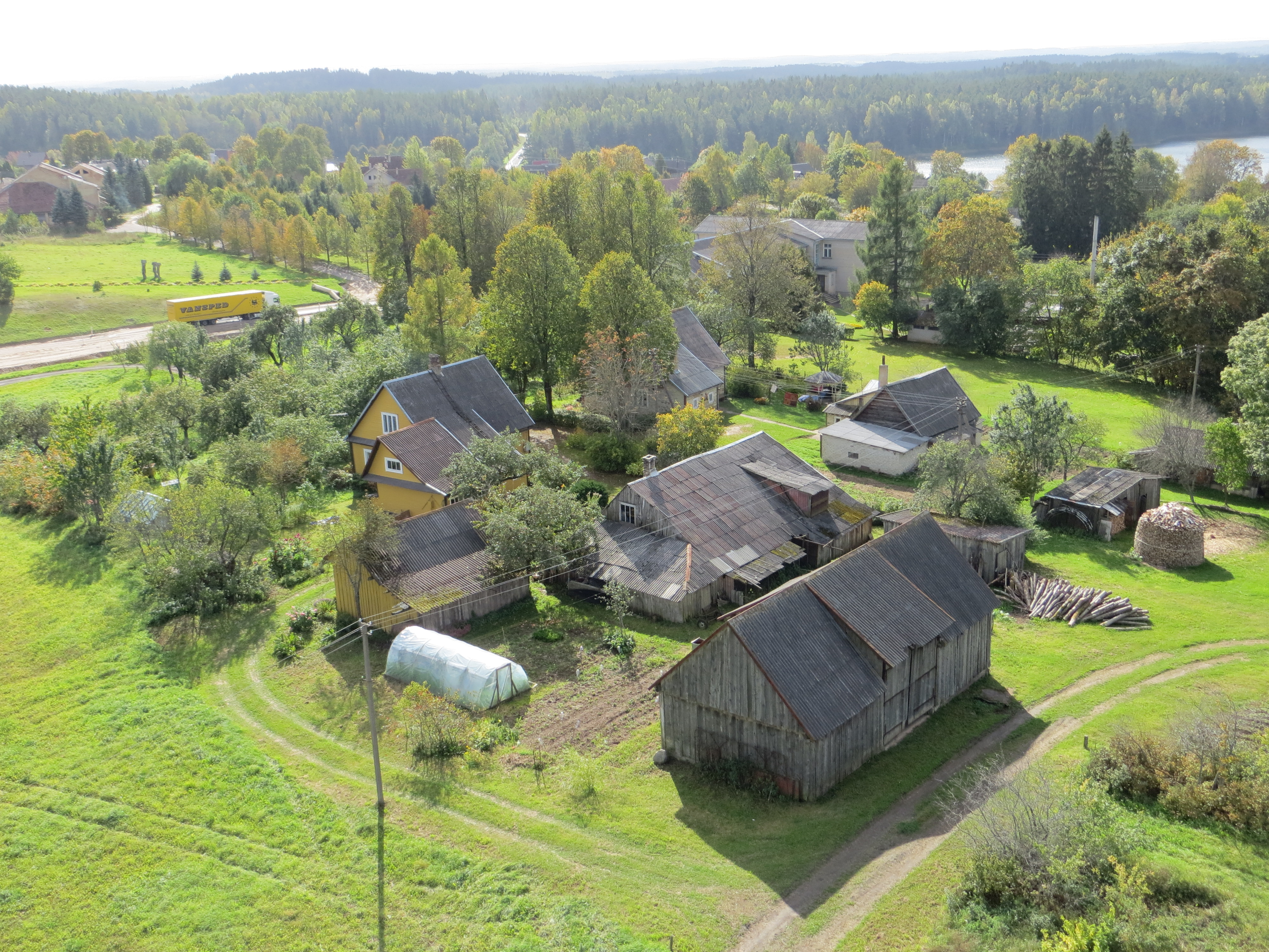 Degučiai, Lithuania